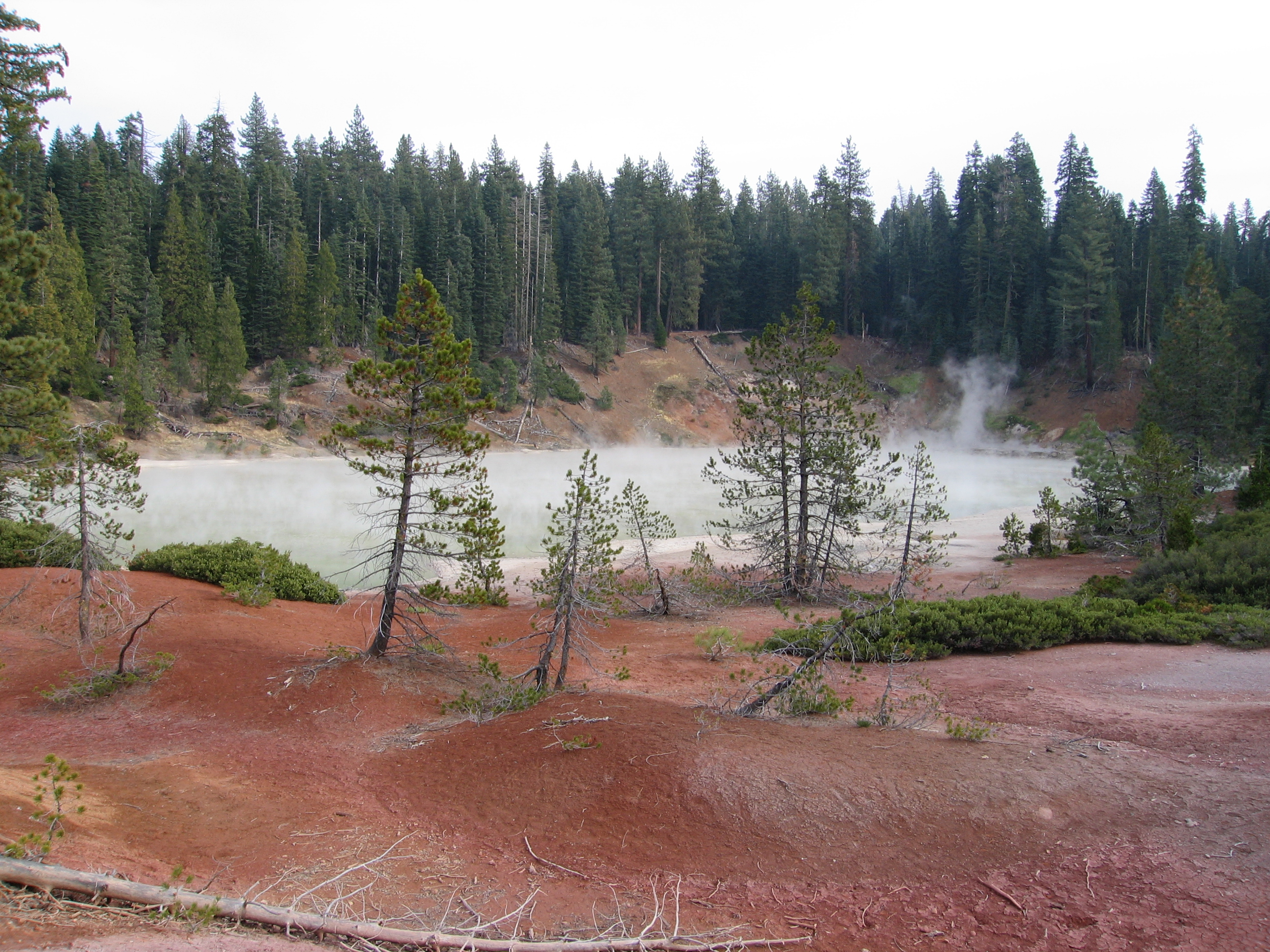 Boiling Springs Lake